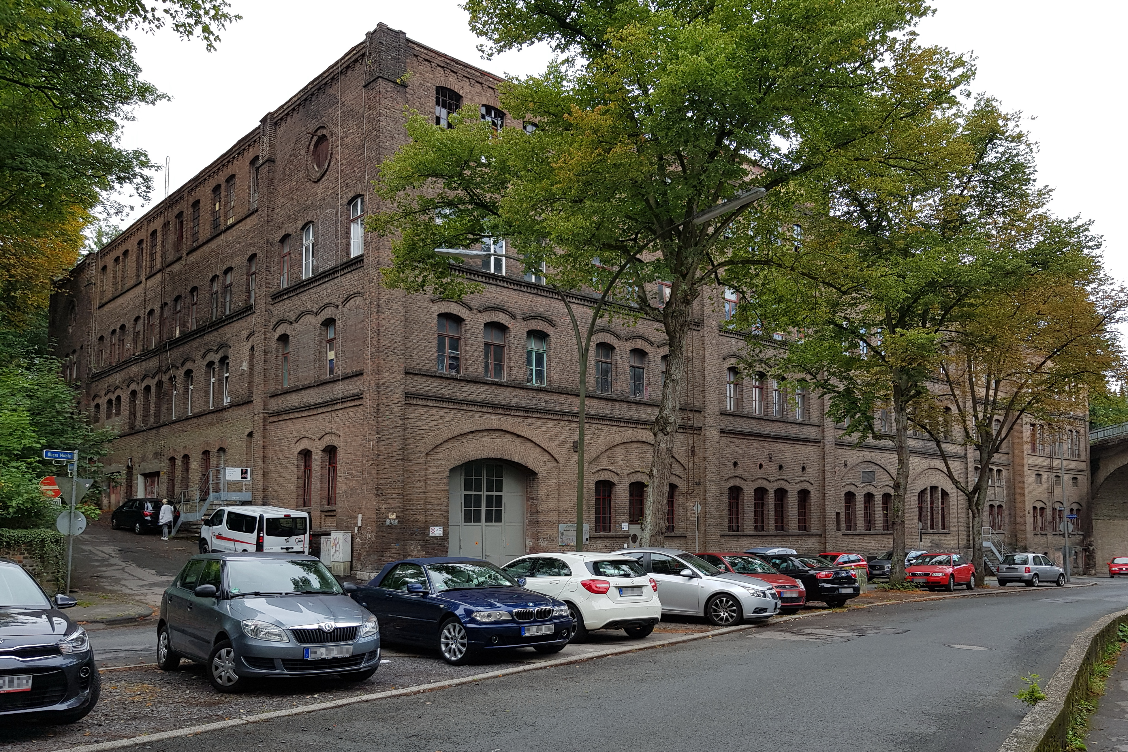 Denkmalgeschütztes Industriegebäude des ehemaliges Unternehmens Kissing & Möllmann in Iserlohn, Obere Mühle 28, am Tag des offenen Denkmals 2019. This image shows a heritage building in Germany, located in the North Rhine-Westphalian city Iserlohn (no. 106).